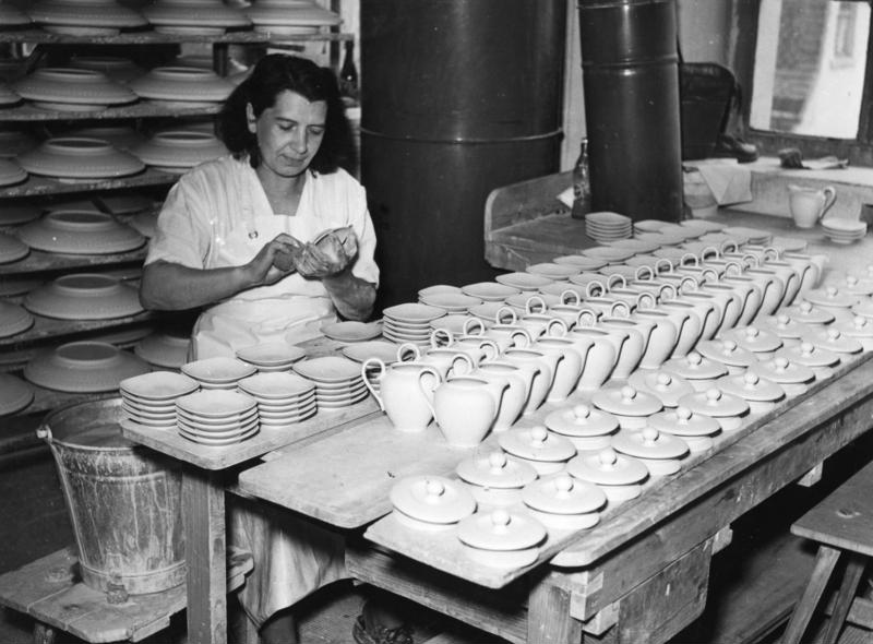 Verein der keramischen Industrie, Selb Verputzen von Rohgeschirren mittels eines Schwammes